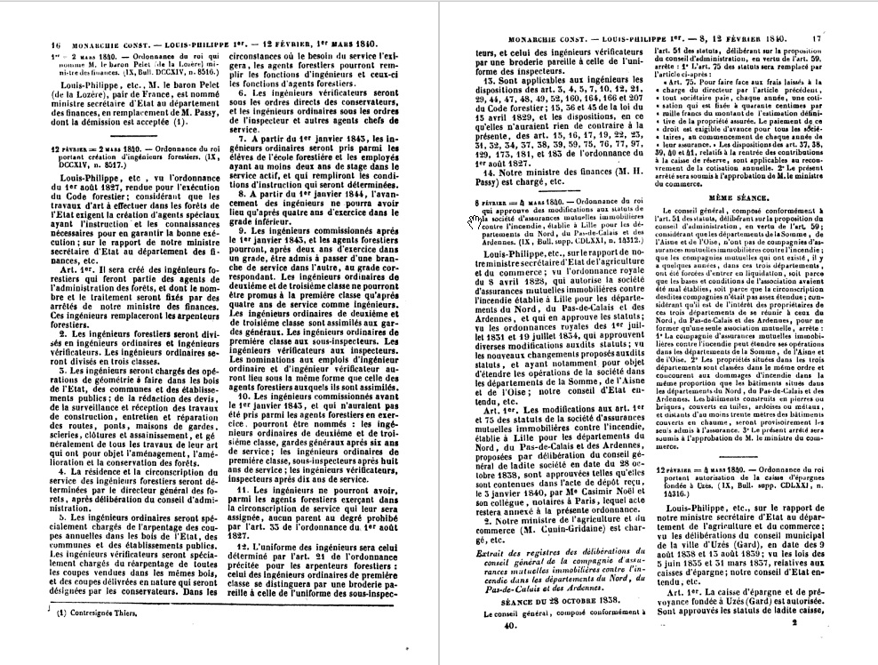 Ordonnance du roi du 2 mars 1840 portant création d'ingénieurs forestiers (IX, DCCXIV, Template:Numéro avec majuscule).